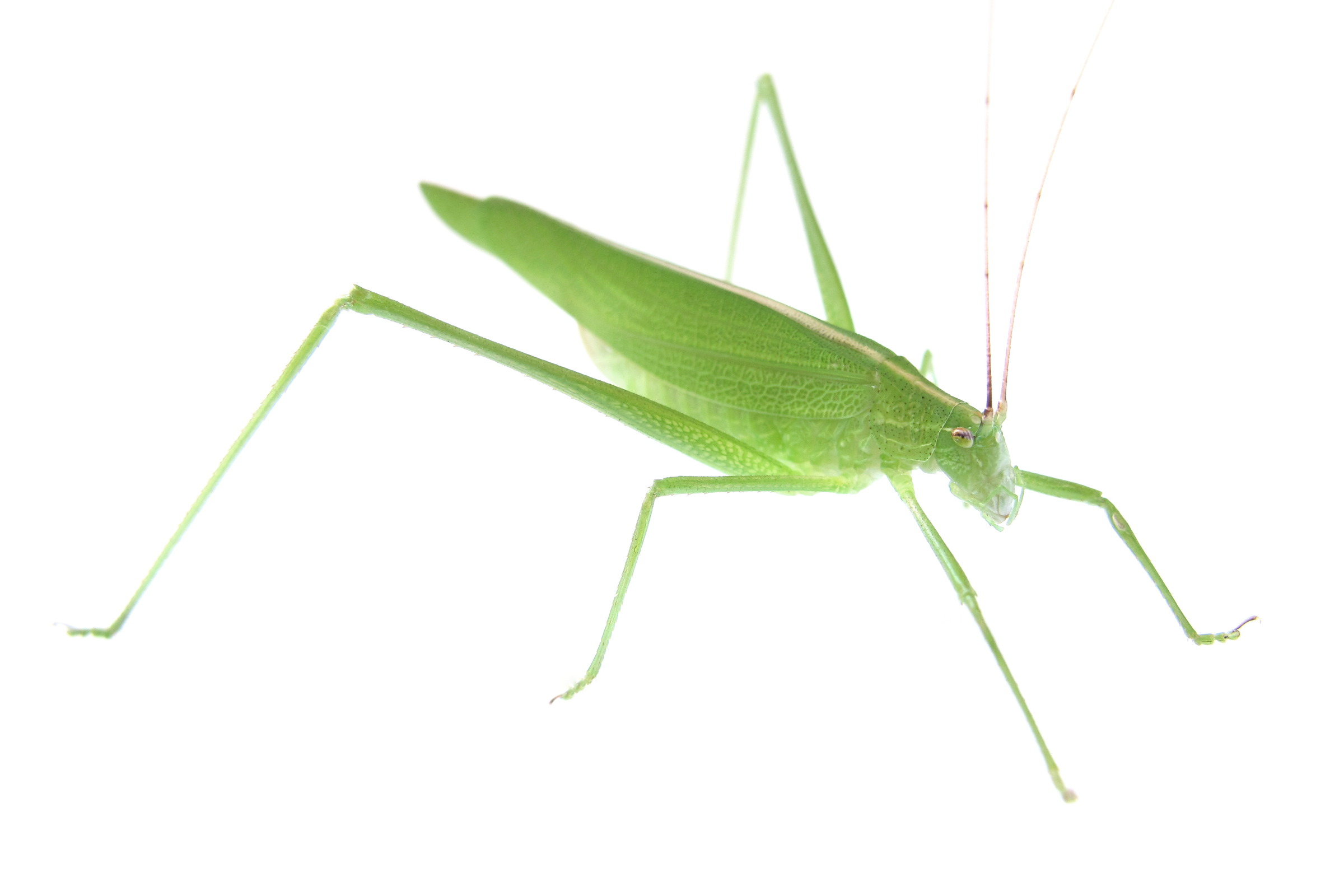 Ducetia japonica セスジツユムシ